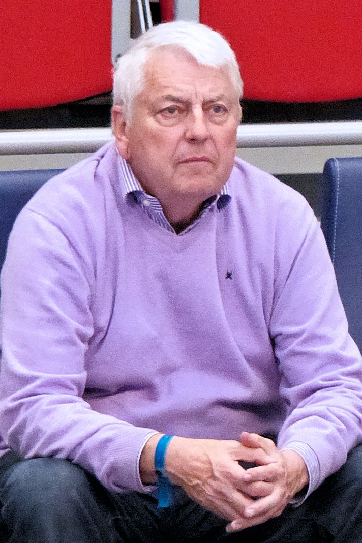 Charles Biétry directeur délégué de la chaîne de télévision beIN Sports. Le 22 mai 2014.